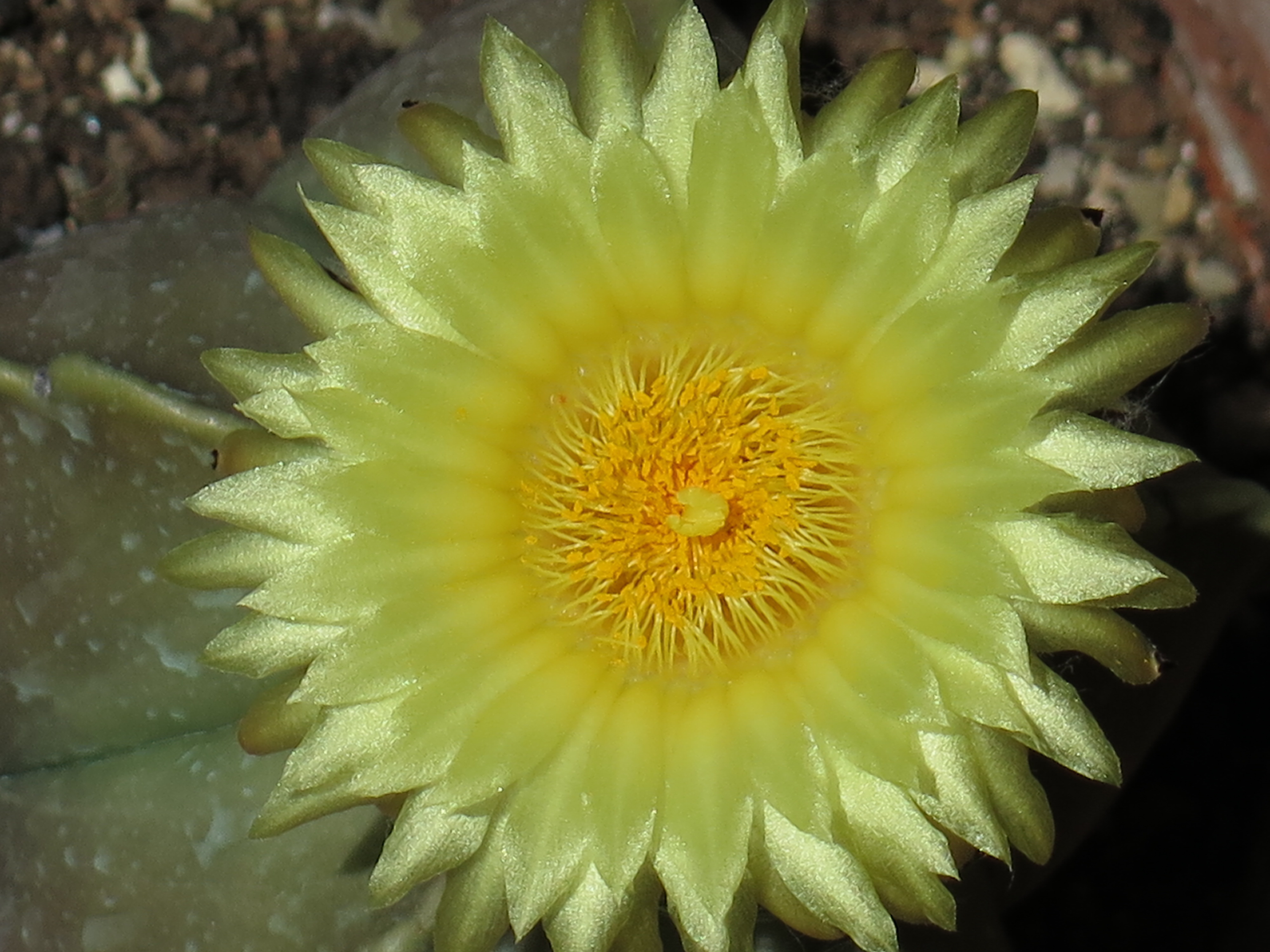 Il fiore dell'astrophytum myriostigma nudum